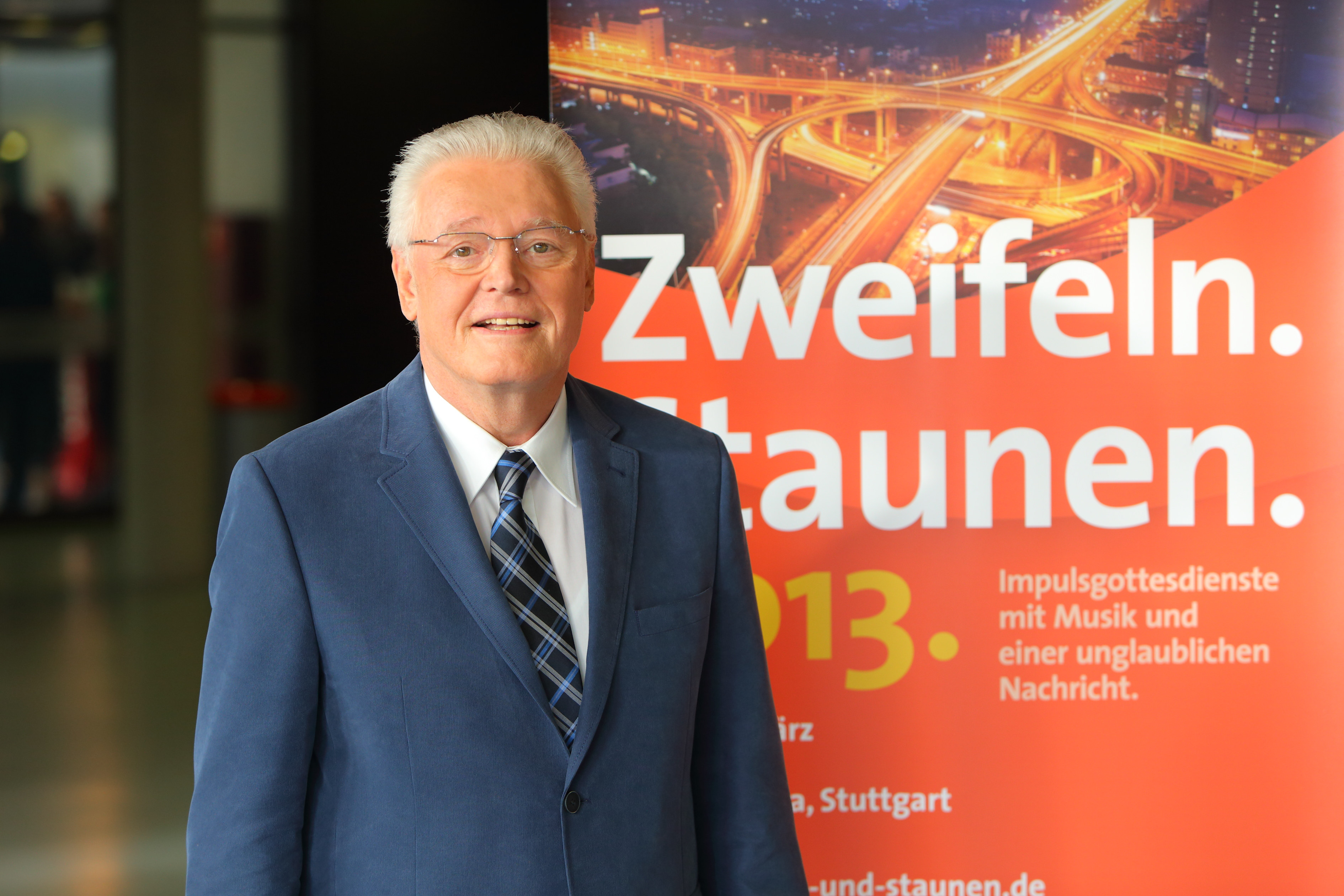 Pfarrer Ulrich Parzany ist der Hauptredner von ProChrist. Er gibt an jedem Abend Impulse rund um das Thema »Zweifeln und Staunen«.